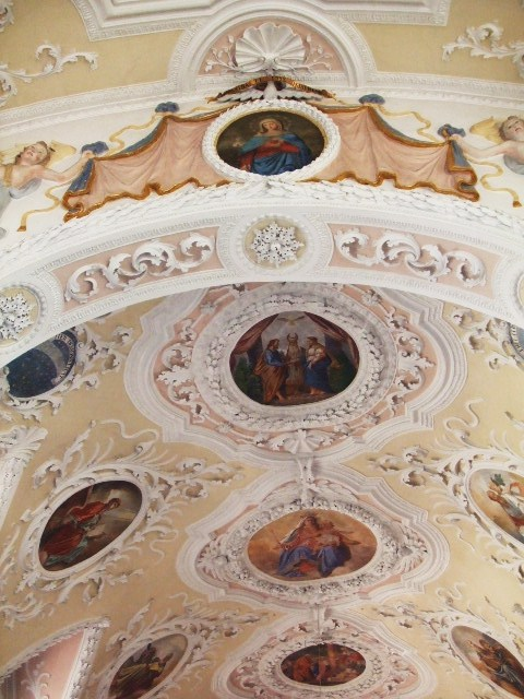 Kath. Pfarrkirche St. Georg, Bedernau, Gemeinde Breitenbrunn, Landkreis Unterallgäu Decke